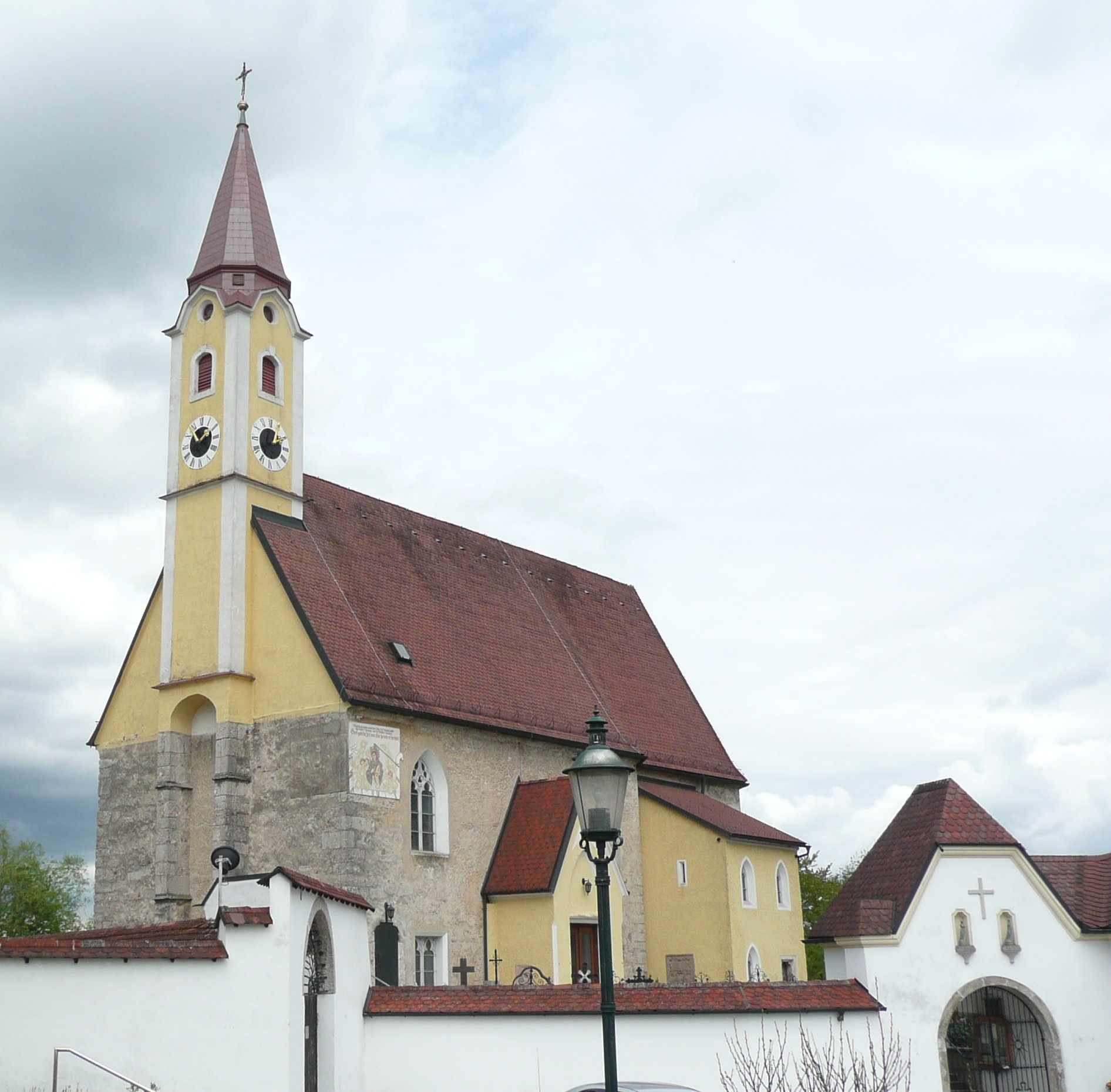 Pfarrkirche Schleißheim